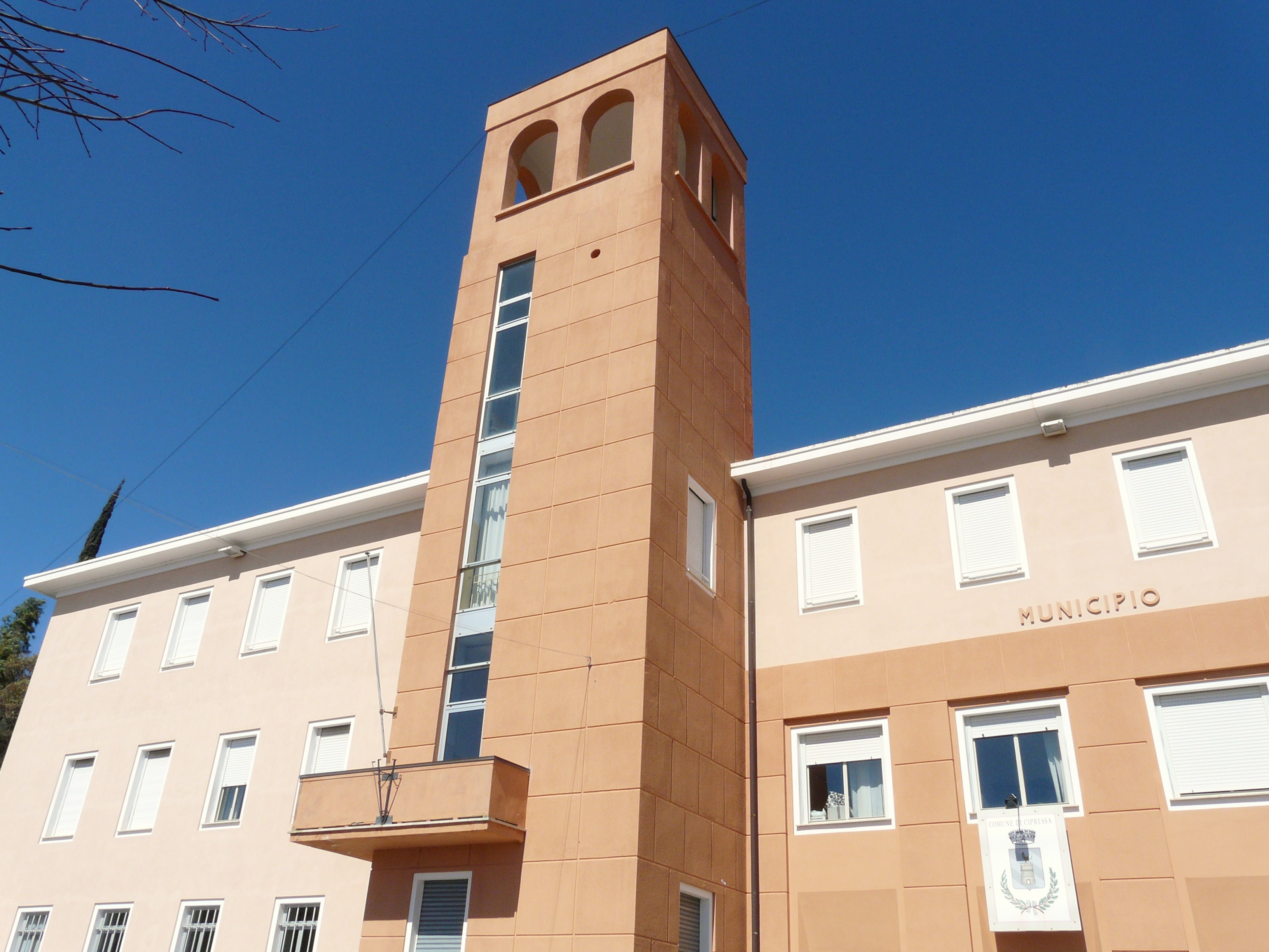 Municipio, Cipressa, Liguria, Italia